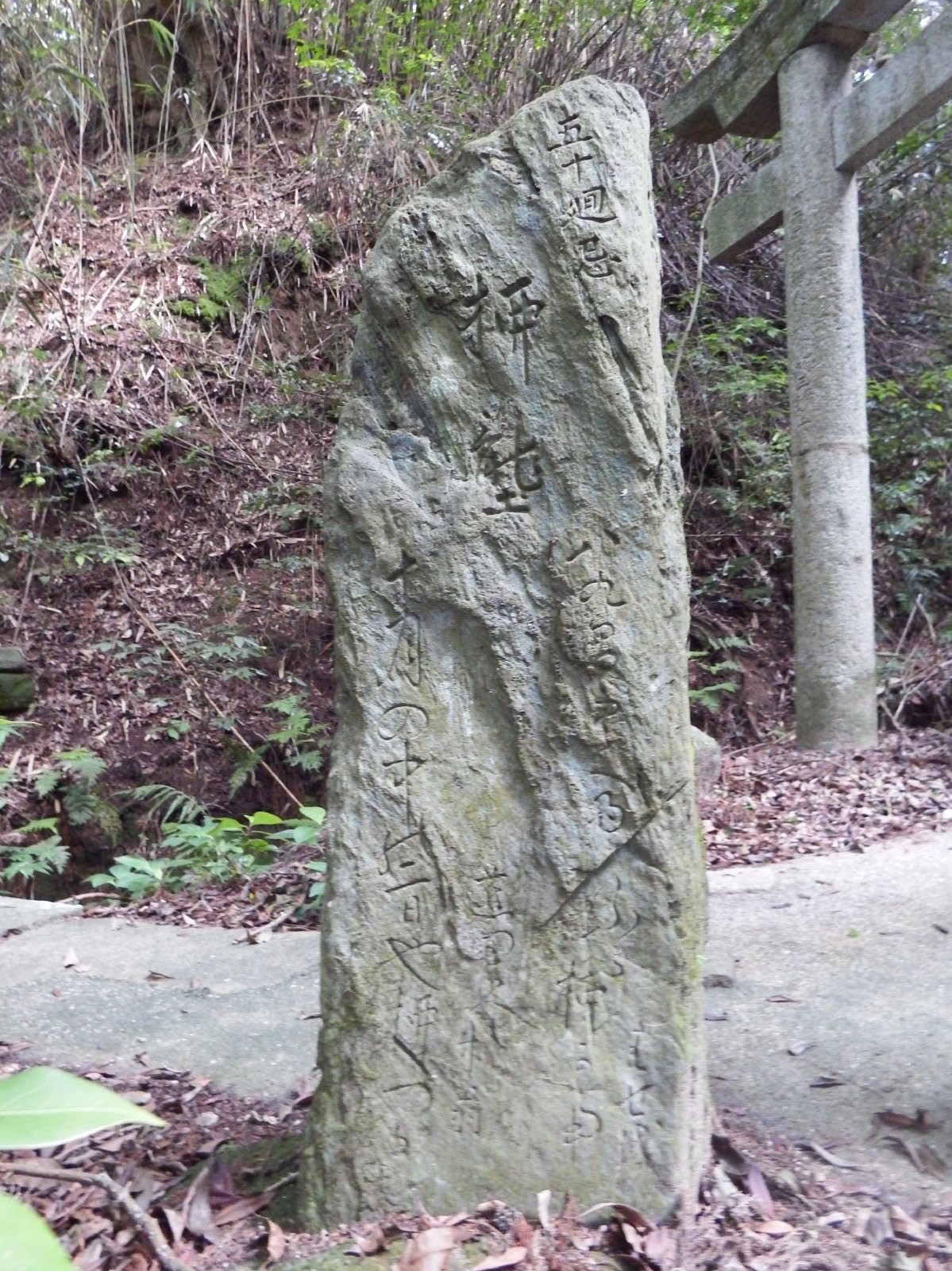 太山寺の芭蕉句碑